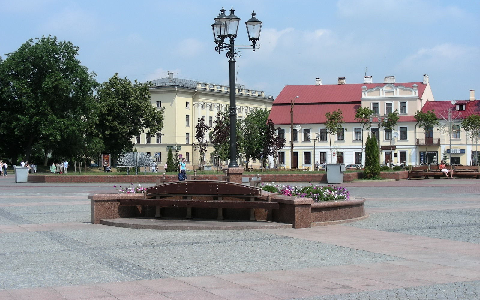 BELARUS / GRODNO (Гродна). Savieckaja square.